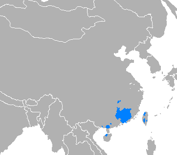 Idioma hakka